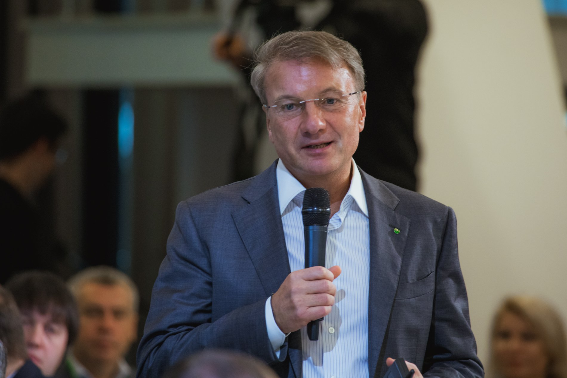 Герман Оскарович Греф (род.1964) — российский государственный деятель